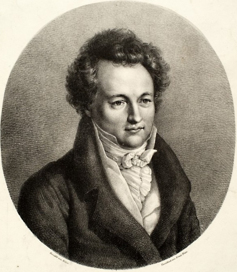 Karl Philipp Kayser (1773–1827), Direktor des Heidelberger Gymnasiums und Professor an der Universität Heidelberg. Zeichnung von Ernst Fries nach einem Gemälde von Christian Xeller